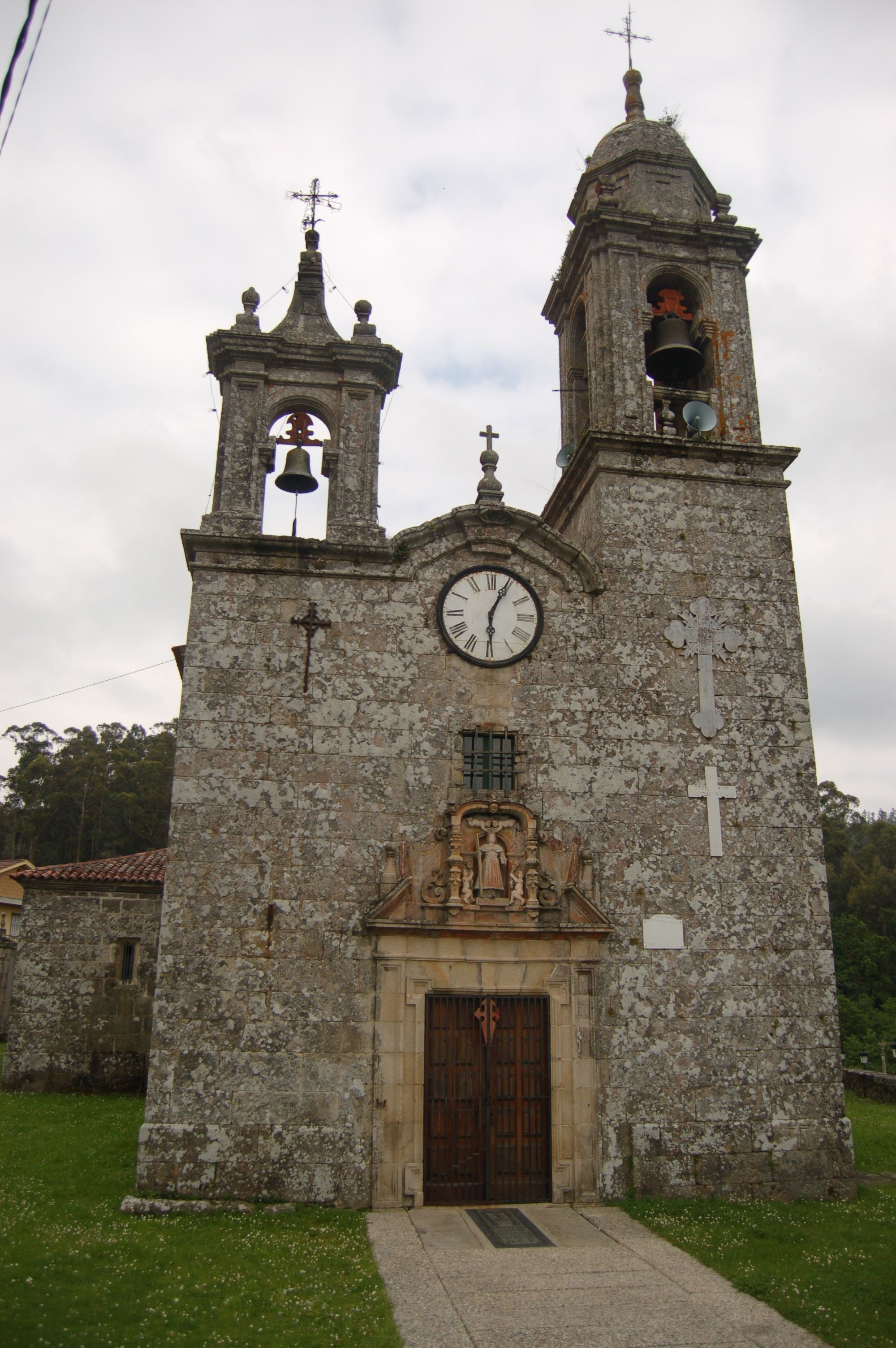 Igrexa parroquial de Santa Xusta de Moraña (Moraña)